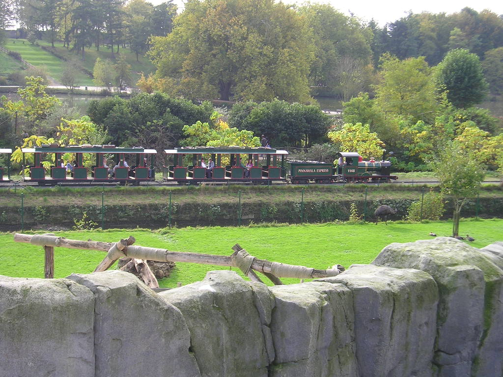 Premier train à vapeur à Paradisio